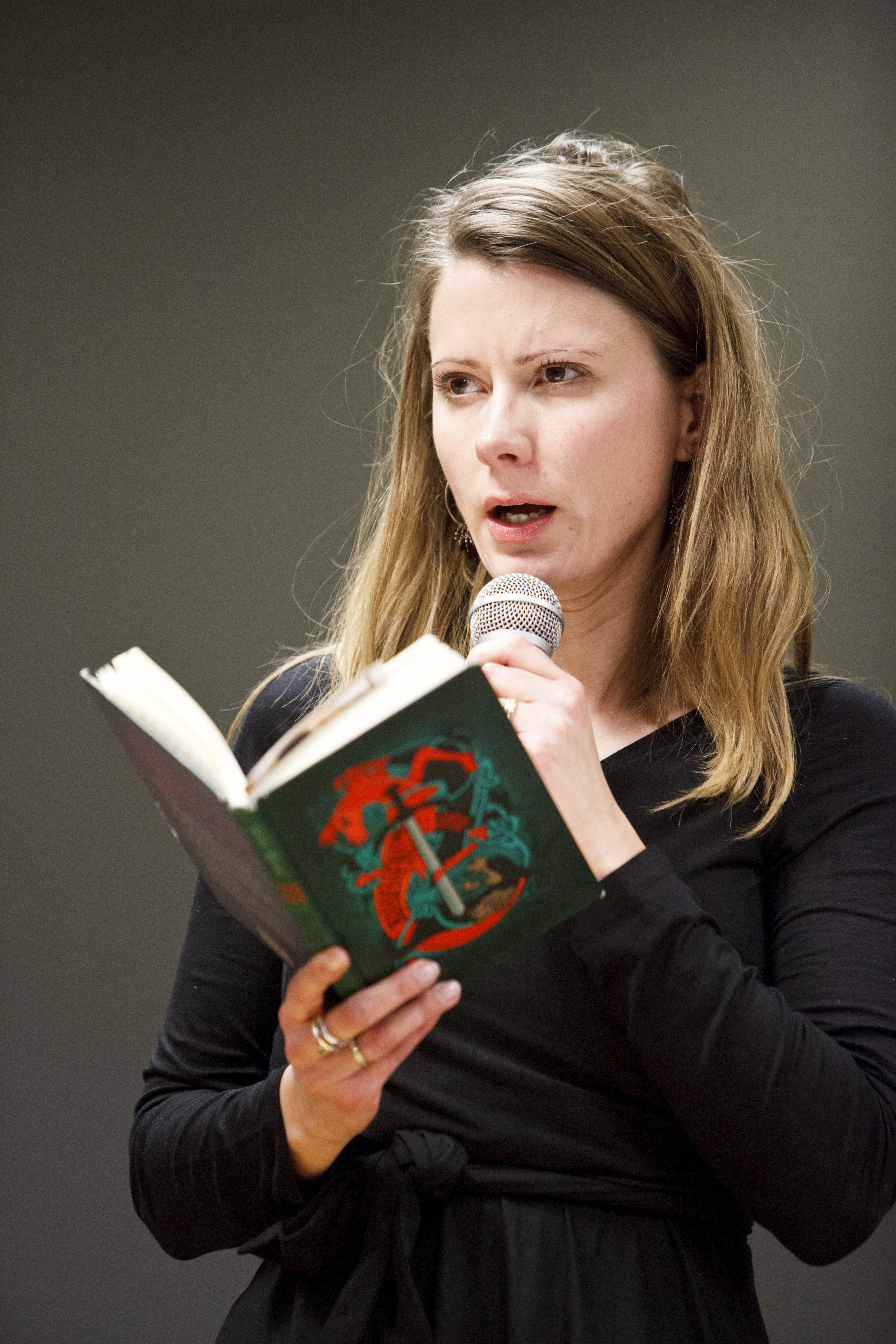 Gerður Kristný fra Island, nomineret til Nordisk Råds litteraturpris 2012 til litteraturarrangement hos Kulturkontakt Nord i Finland.